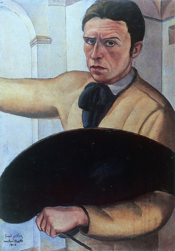 Autoritratto, olio su tela di Fred Pittino, 1928 Udine, Civici musei, Galleria d'arte moderna